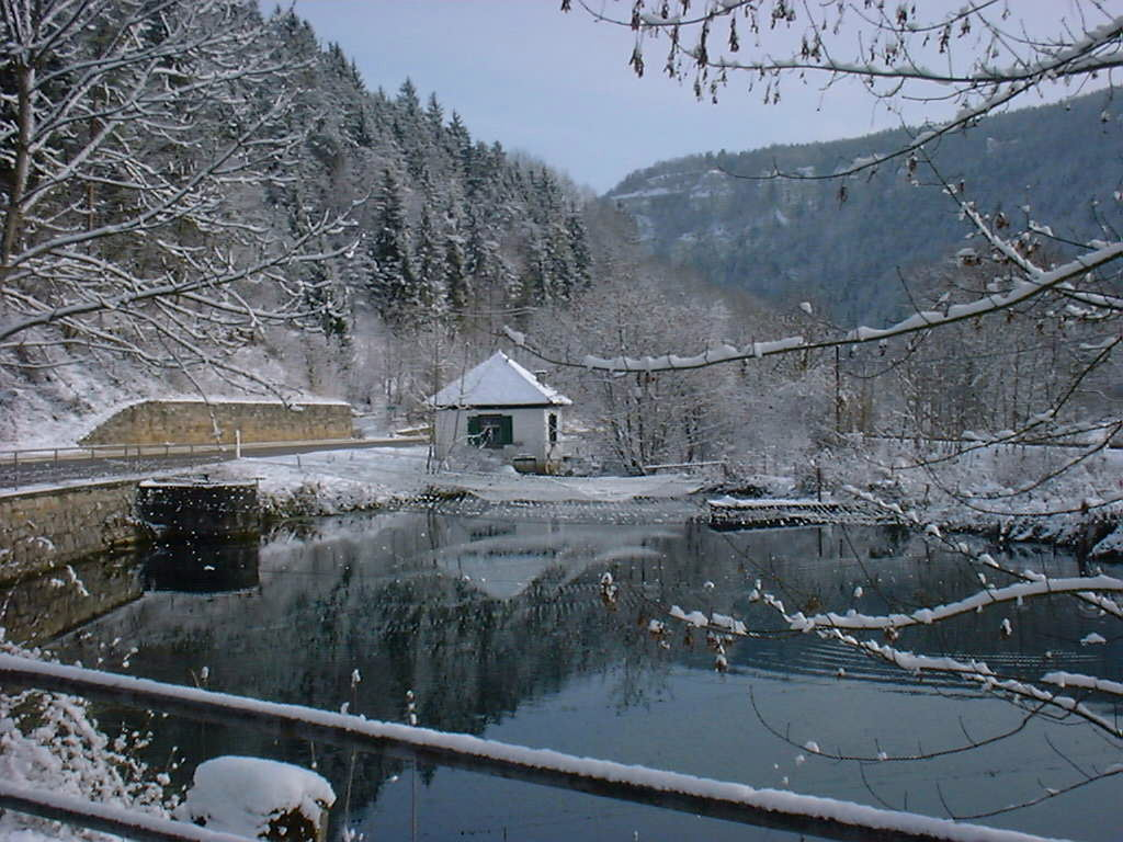 Pumpenhaus zur Versorgung des Schloss Werenwag (Donautal) mit Trinkwasser